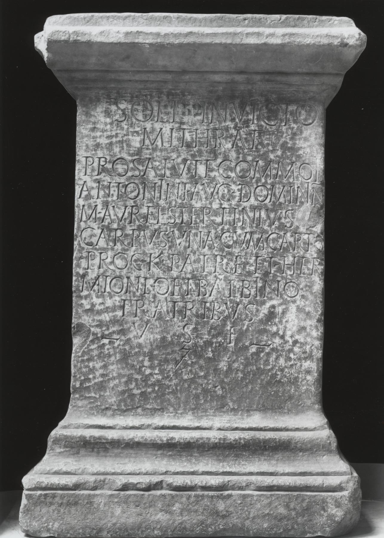 CIL VI 727: Soli Invicto / Mithrae / pro salute Commodi / Antonini Aug(usti) domini n(ostri) / M(arcus) Aurel(ius) Stertinius / Carpus una cum Carpo / proc(uratore) k(astrensi) patre et Her/mioneo et Balbino / fratribus / v(otum) s(olvit) f(eliciter)